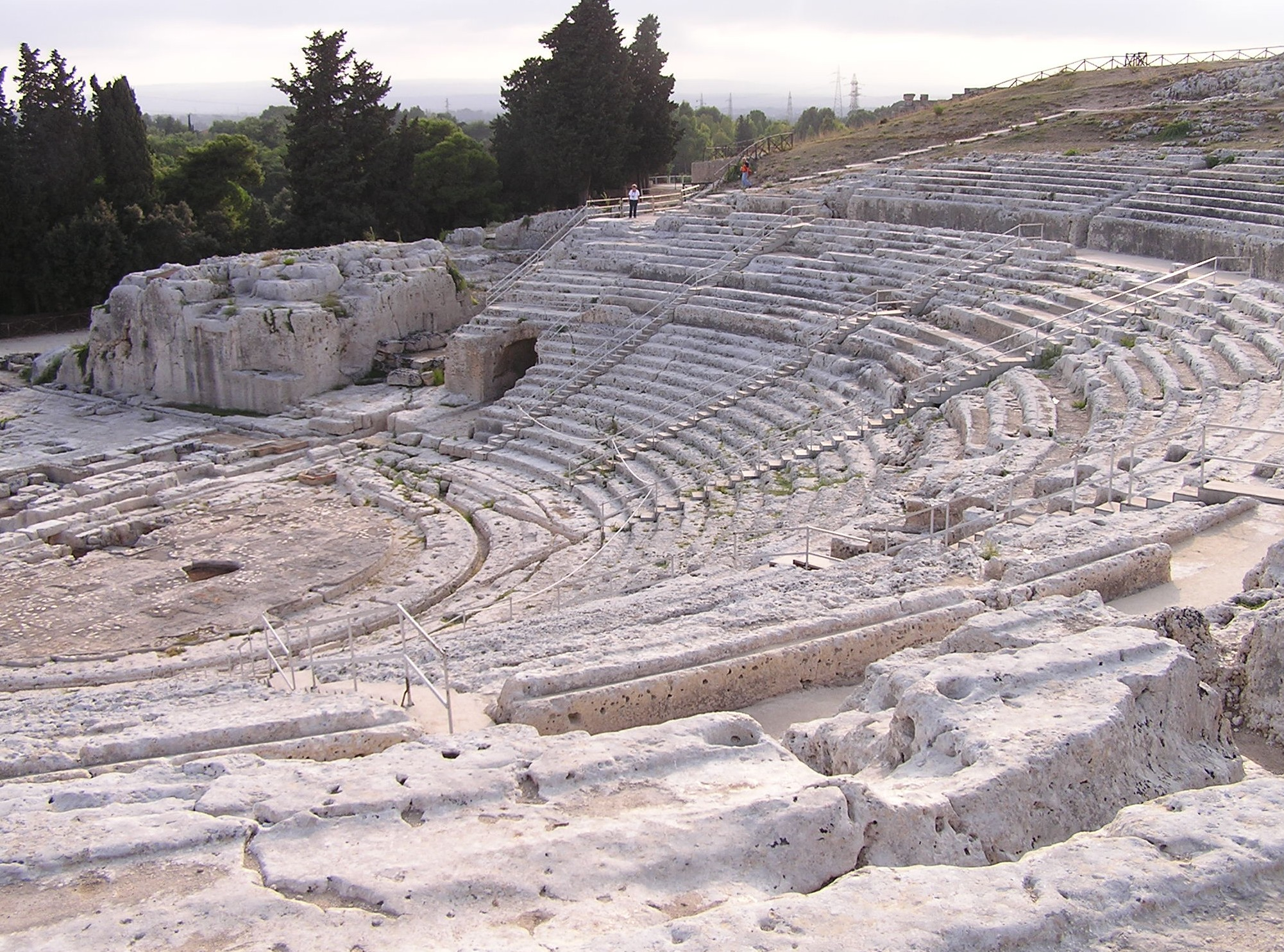 Siracusa, Teatro Greco